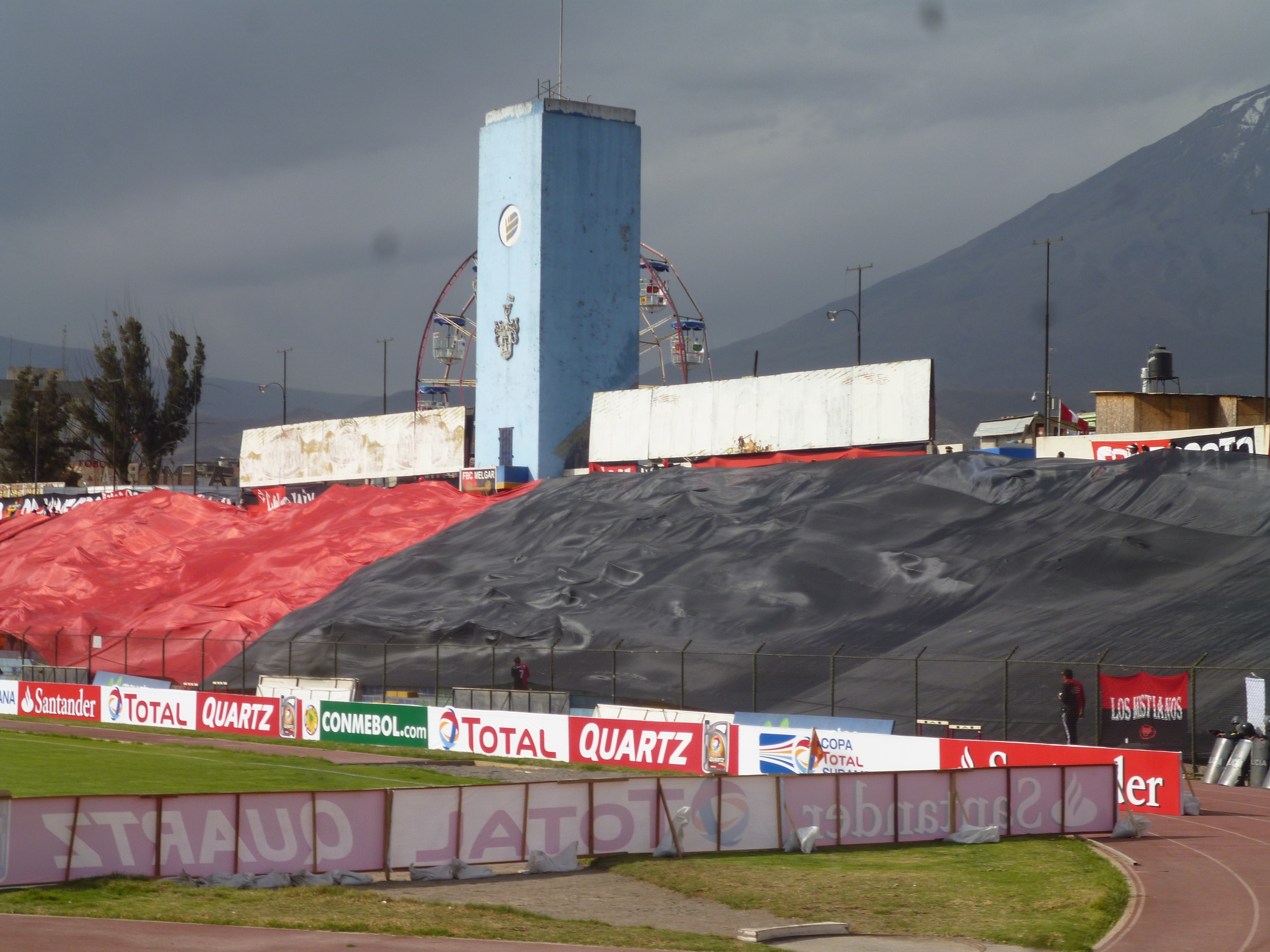 Bandera Rojinegra Gigante desplegada en el partido jugado entre FBC Melgar y Deportivo Pasto por la Copa Sudamericana 2013